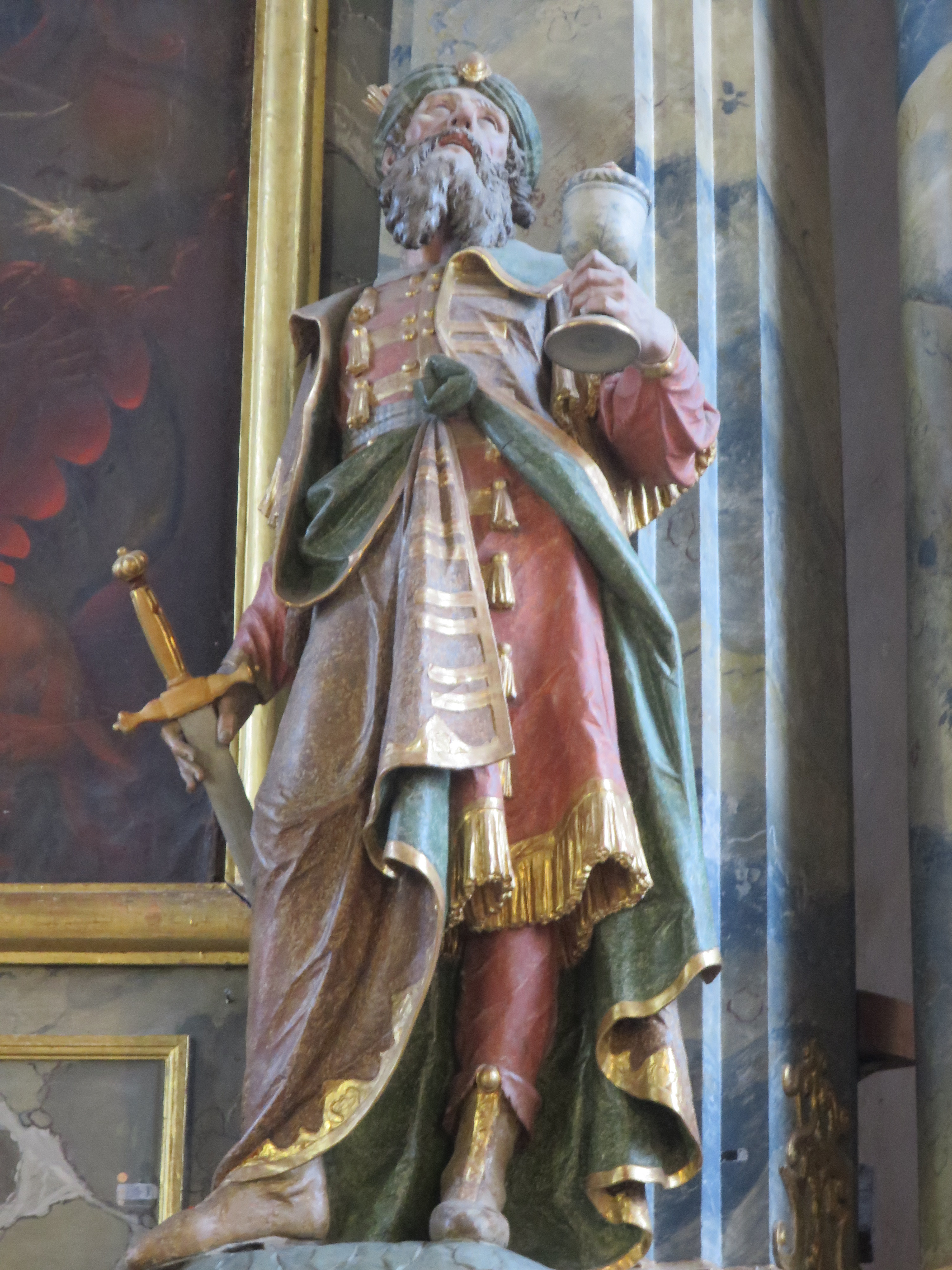 Hl. Damian in morgenländischer Tracht, 1775 von Ignaz Günther, am Hochaltar.